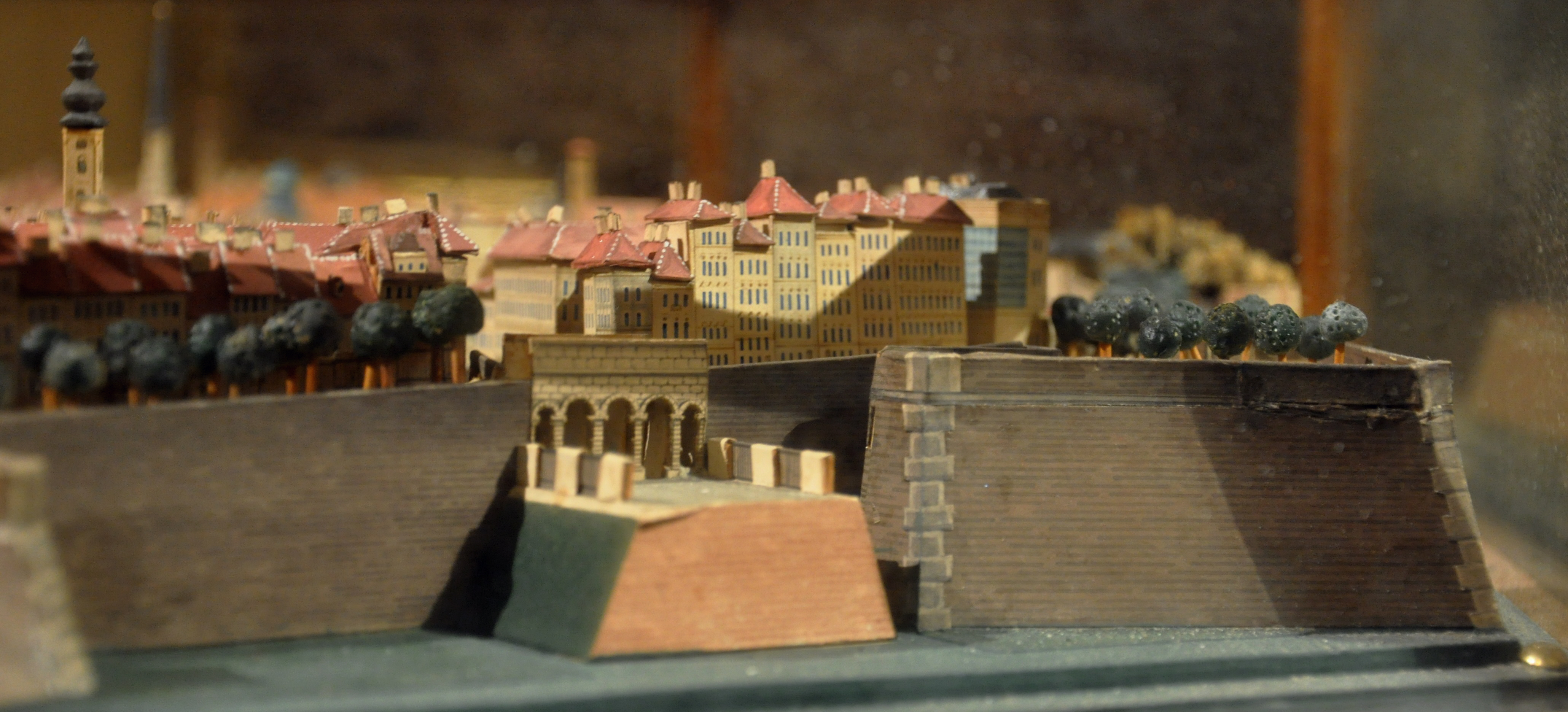 Modell der Stadt Wien um 1845, ausgestellt in der Sammlung Alter Musikinstrumente (des Kunsthistorischen Museums) in der Neuen Burg. Leihgabe von Helmut Czakler, Wien. Schottentor mit Mölkerbastei, links der Turm der Schottenkirche